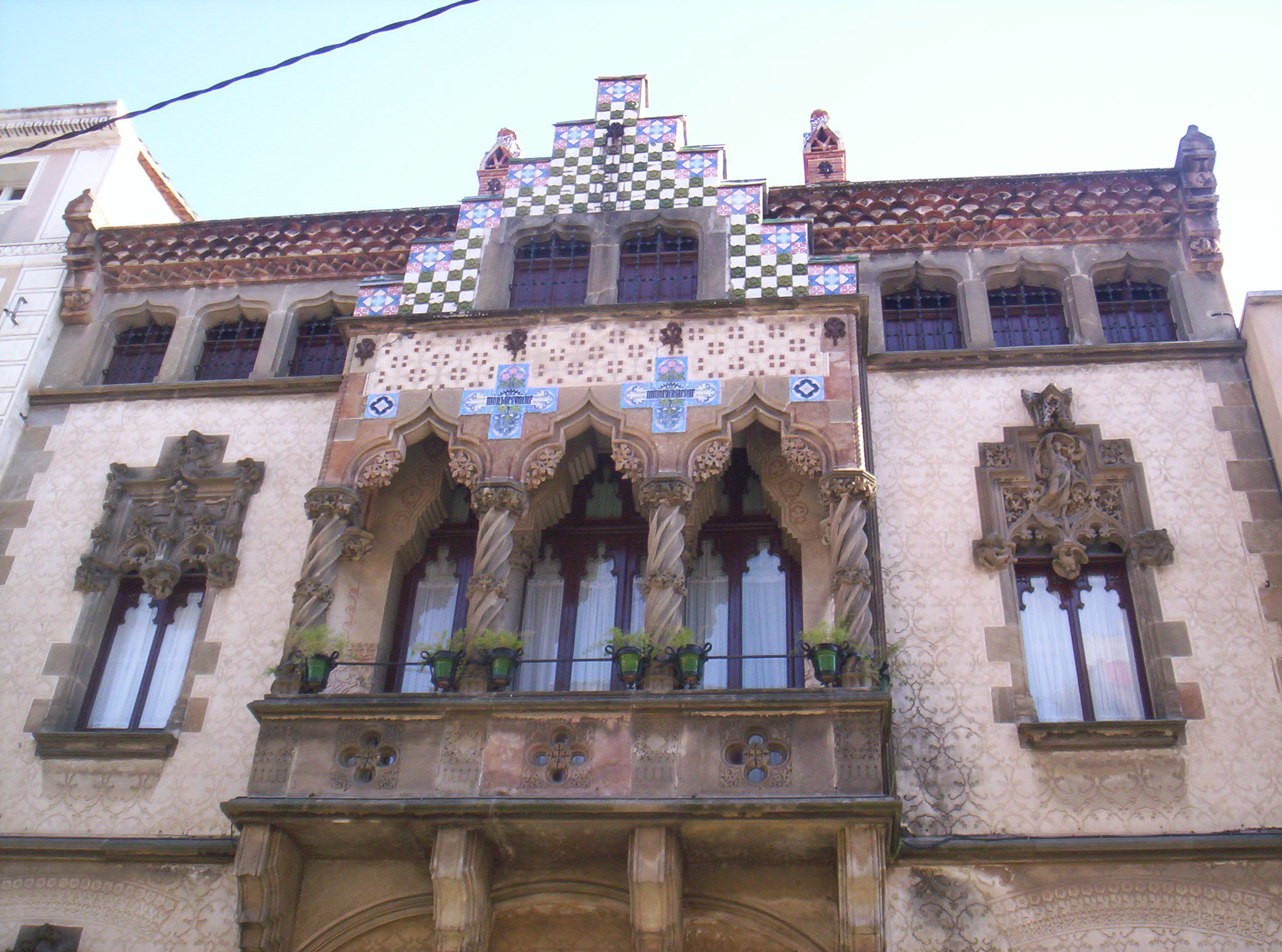 Fachada de la casa Coll i Regàs